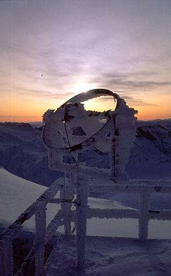 vom Sonnblickobservatorium